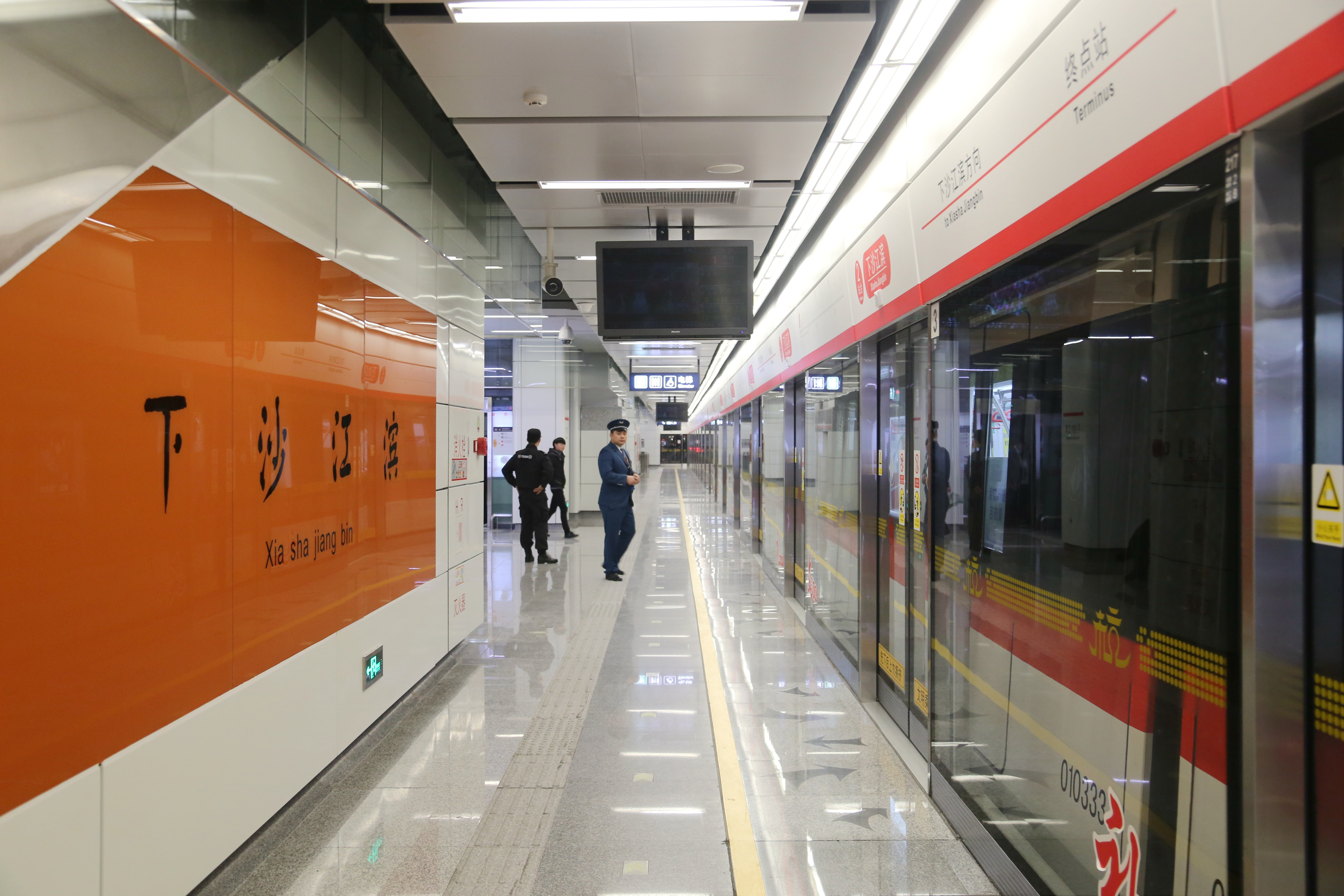 下沙江滨站站台标准角度